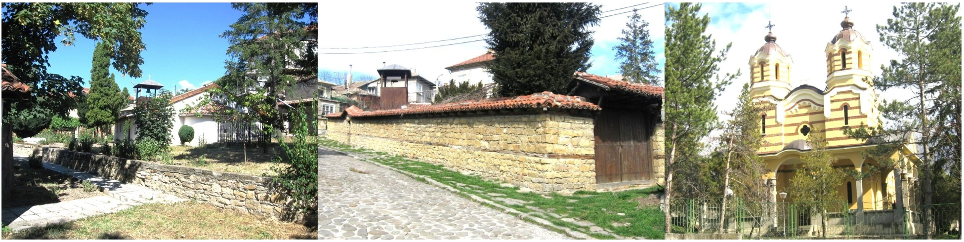 Старата (в ляво и в центъра) и новата (в дясно) църква в Попово.